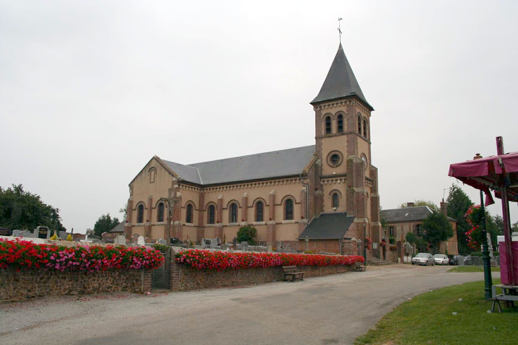 Église Saint-Aubin de Gisay-la-Coudre, Eure (France)